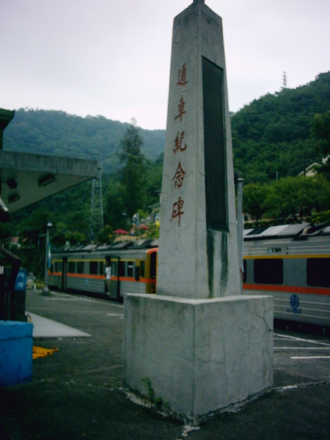 臺灣鐵路管理局內灣車站，內灣線通車紀念碑DR1000型柴油客車。